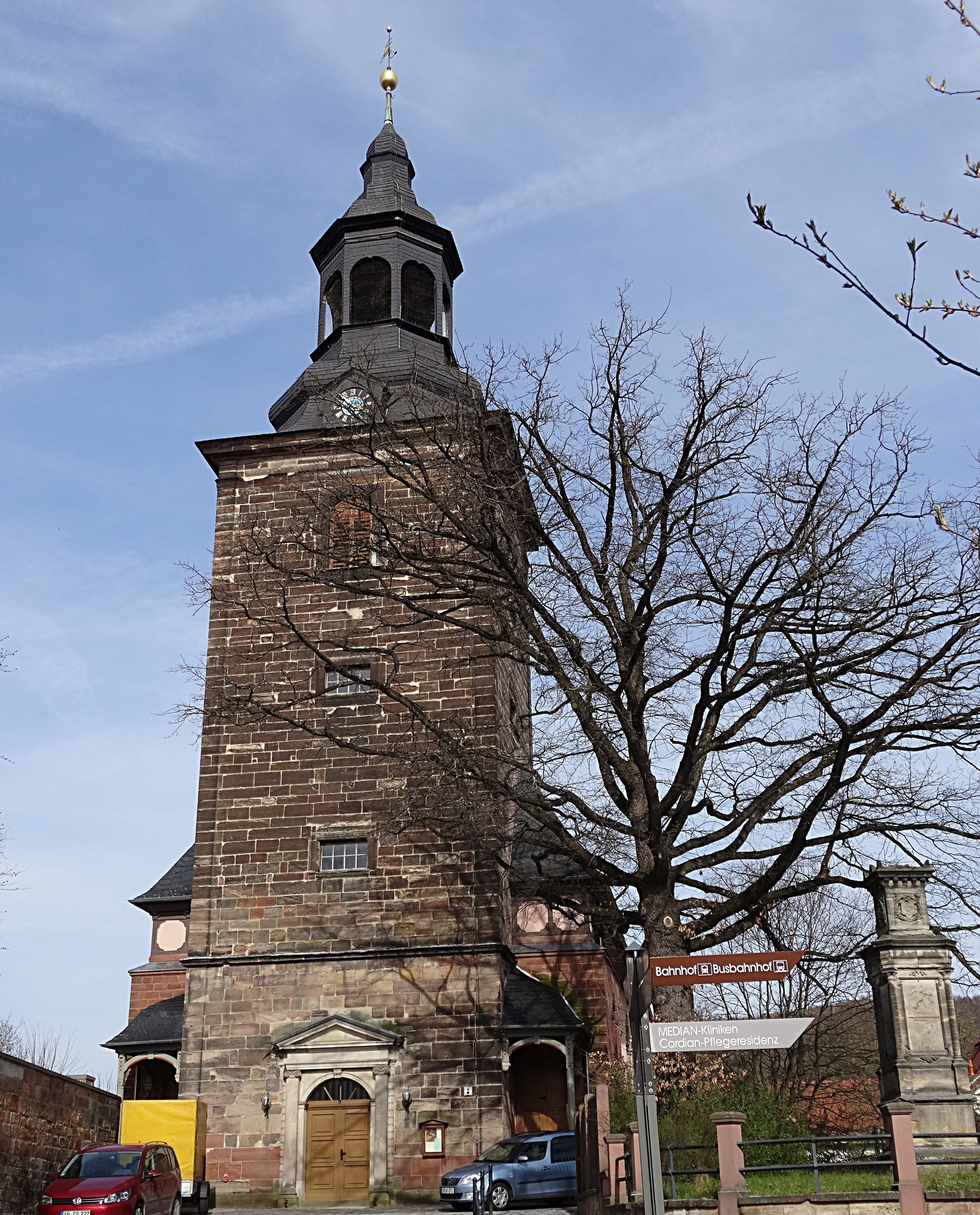 St. Marien Kirche Bad Berka